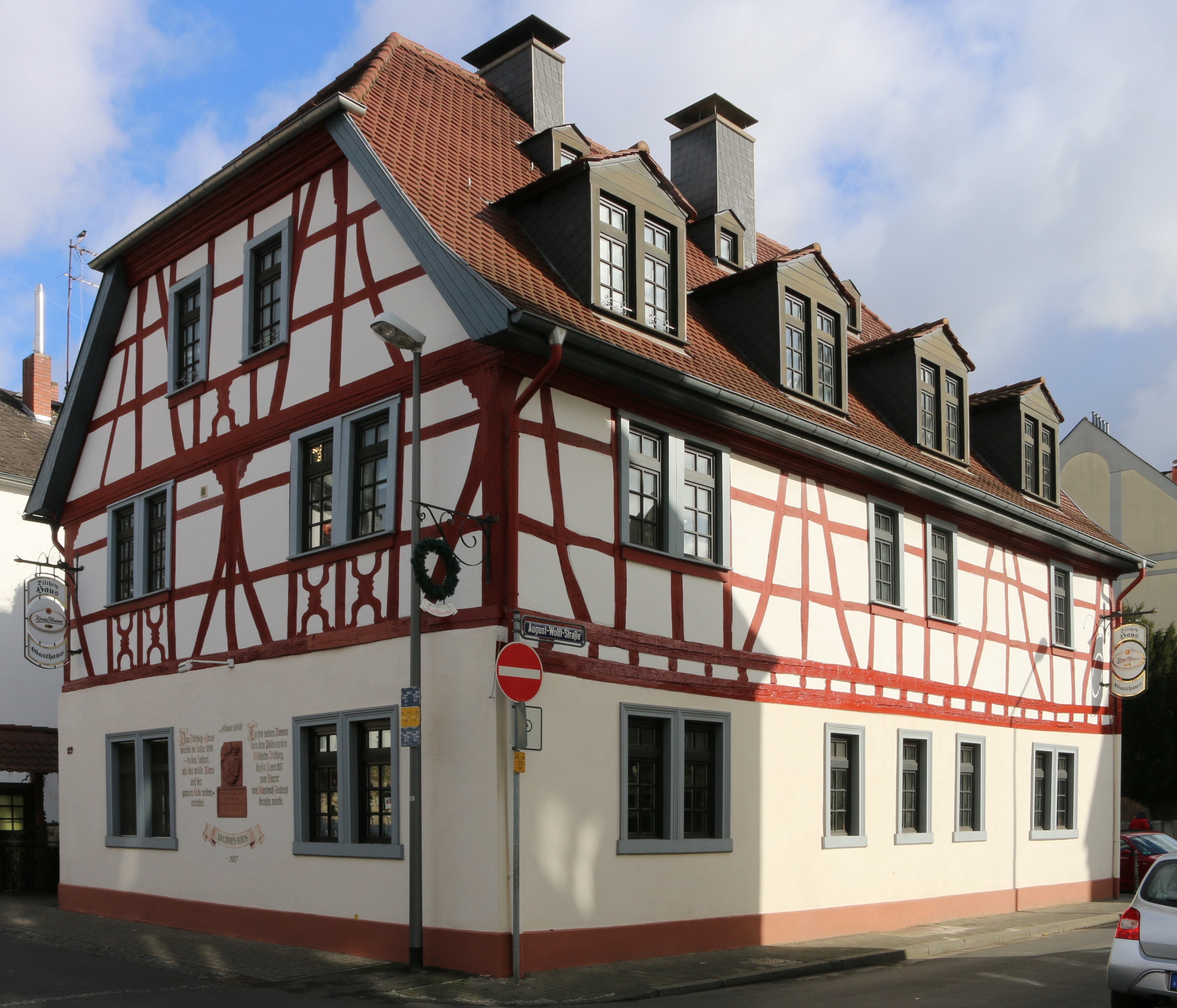 Wiesbaden Biebrich: Dilthey-Haus. Einzelkulturdenkmal